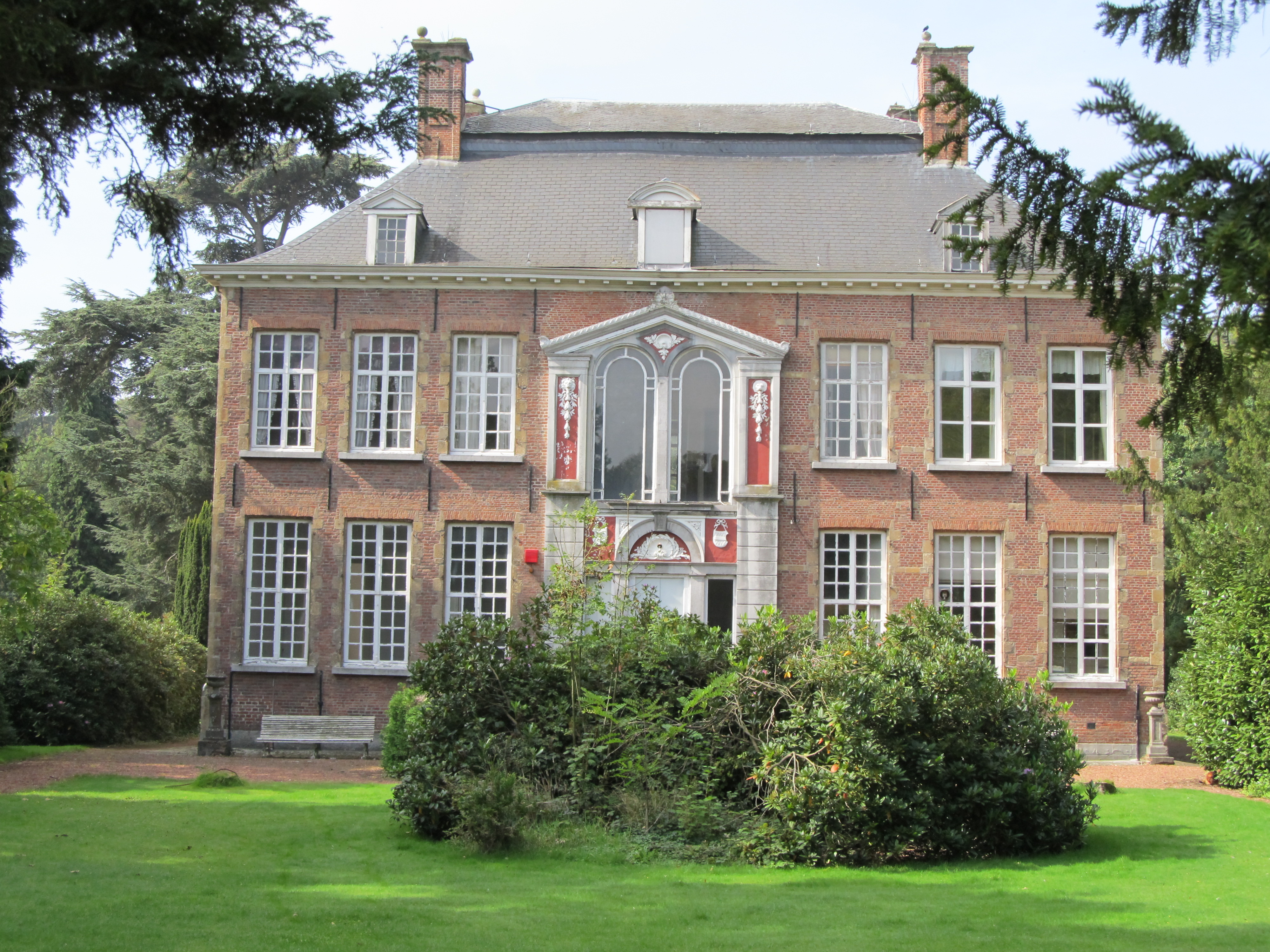 Kasteel van Berlare Dorp 1 Berlare